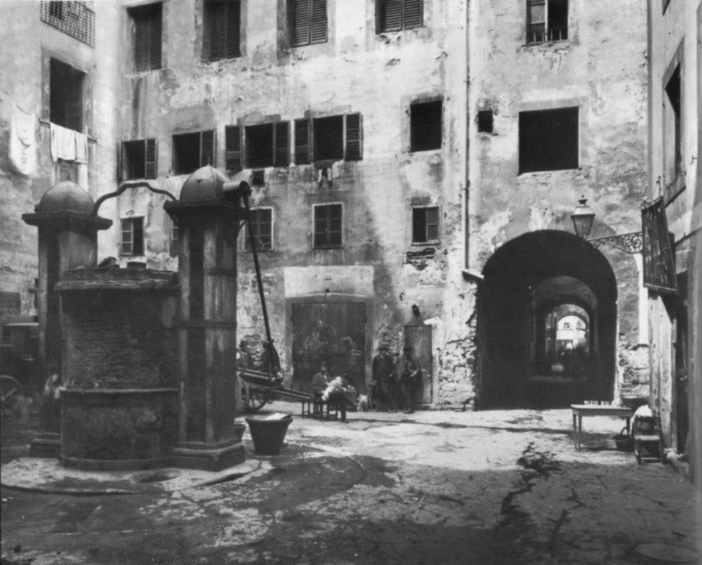 Antico ghetto di firenze before 1885